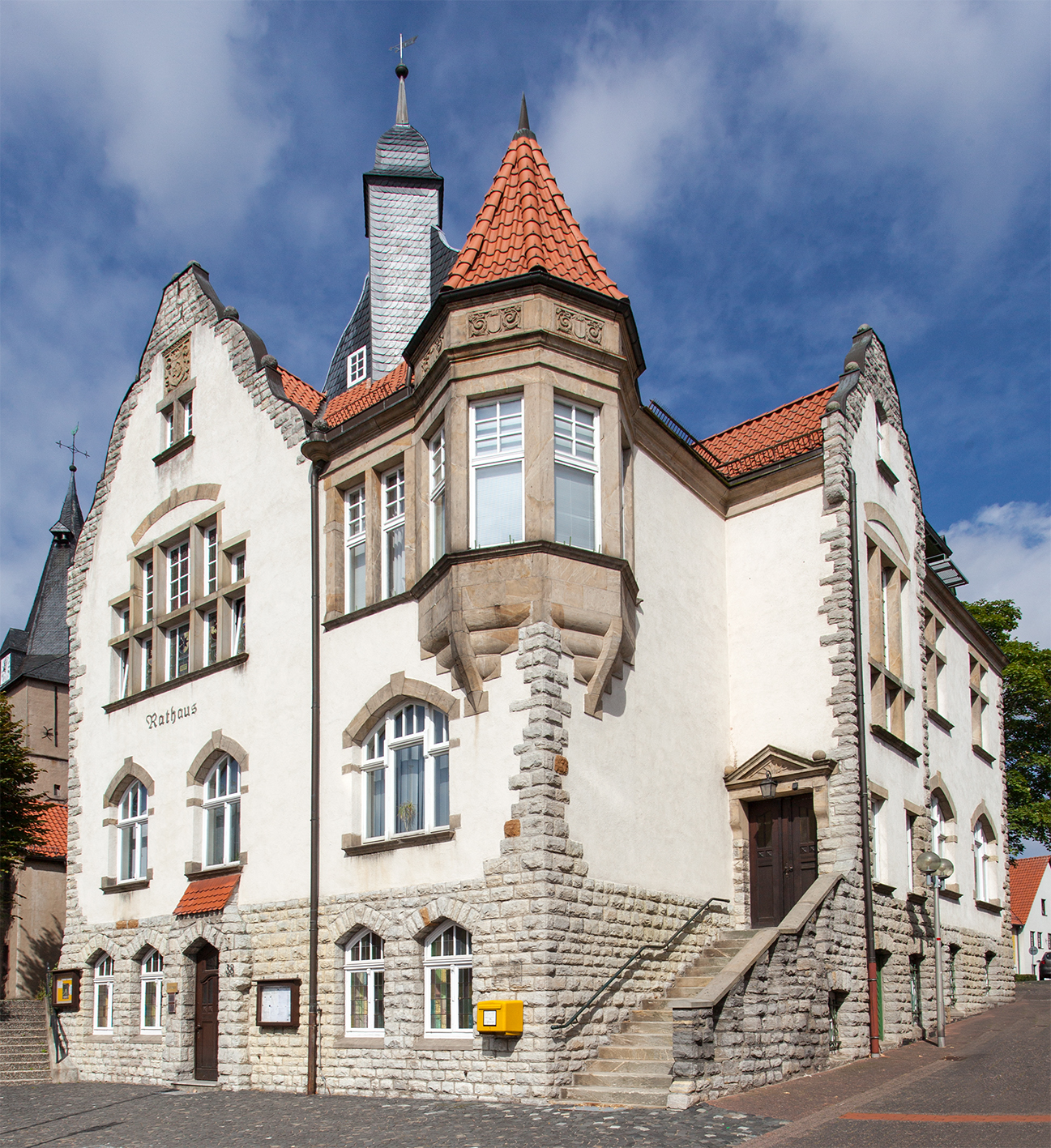 Rathaus von Barntrup, Kreis Lippe This is a photograph of an architectural monument.